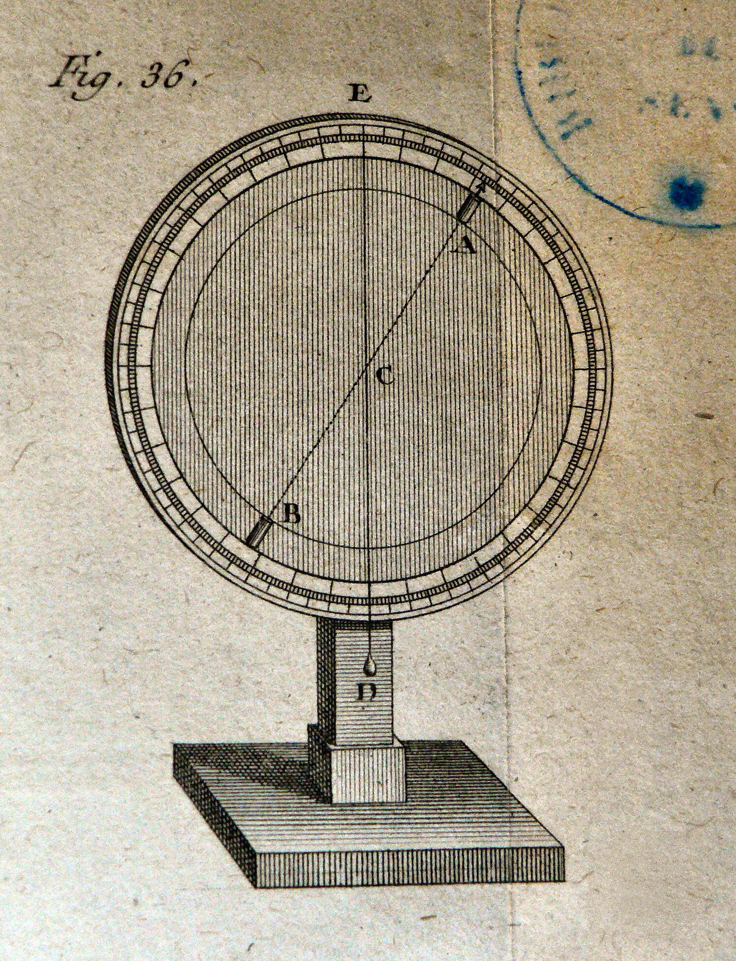 Armilles solsticiales [armille méridienne pour relevés de la hauteur du soleil, particulièrement aux solstices].